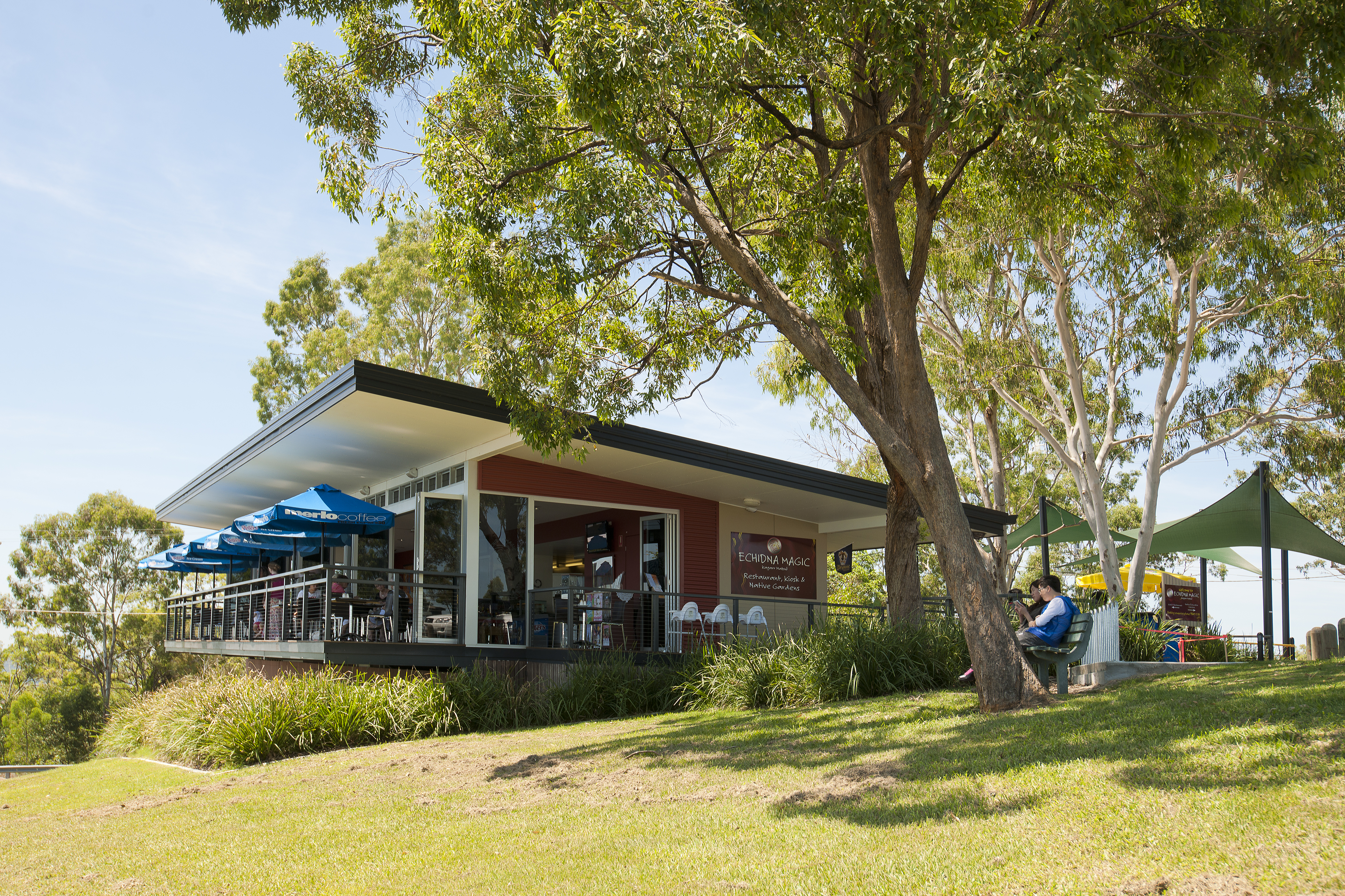 Mt Gravatt Outlook